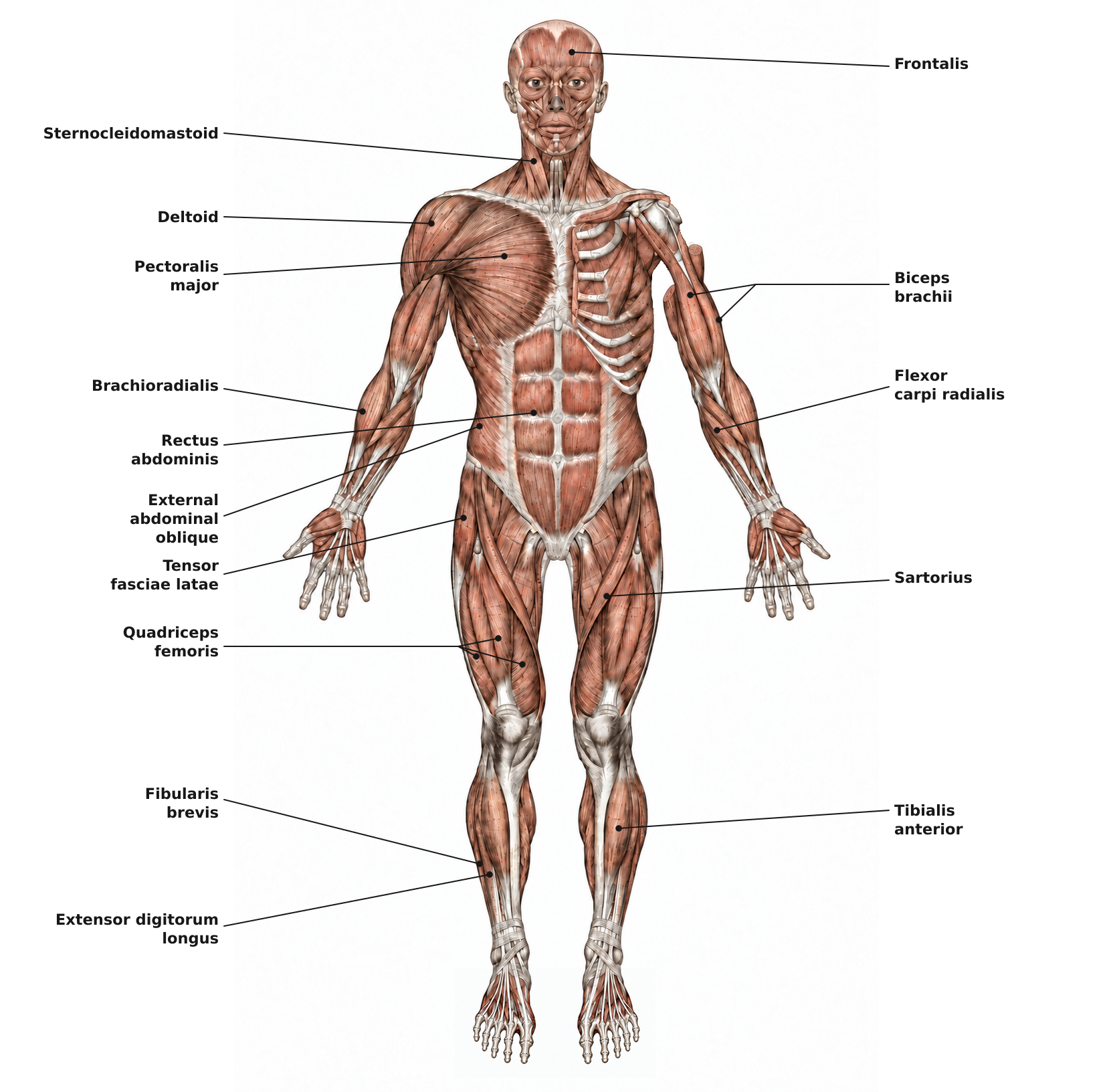 Collage of varius Gray's muscle pictures by Mikael Häggström (User:Mikael Häggström)